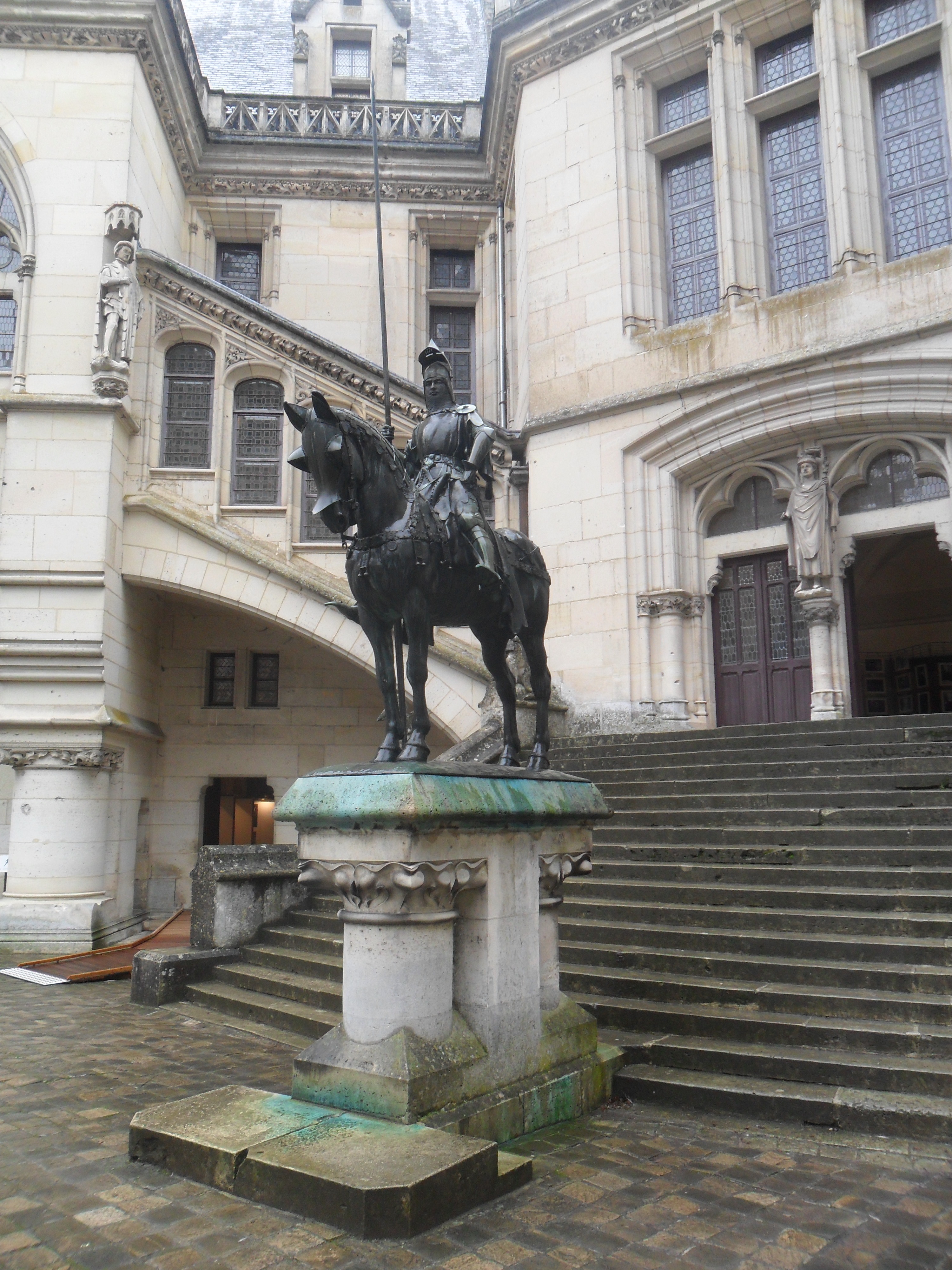 Ruiterstandbeeld voor Lodewijk van Orléans op de binnenplaats van het kasteel van Pierrefonds.